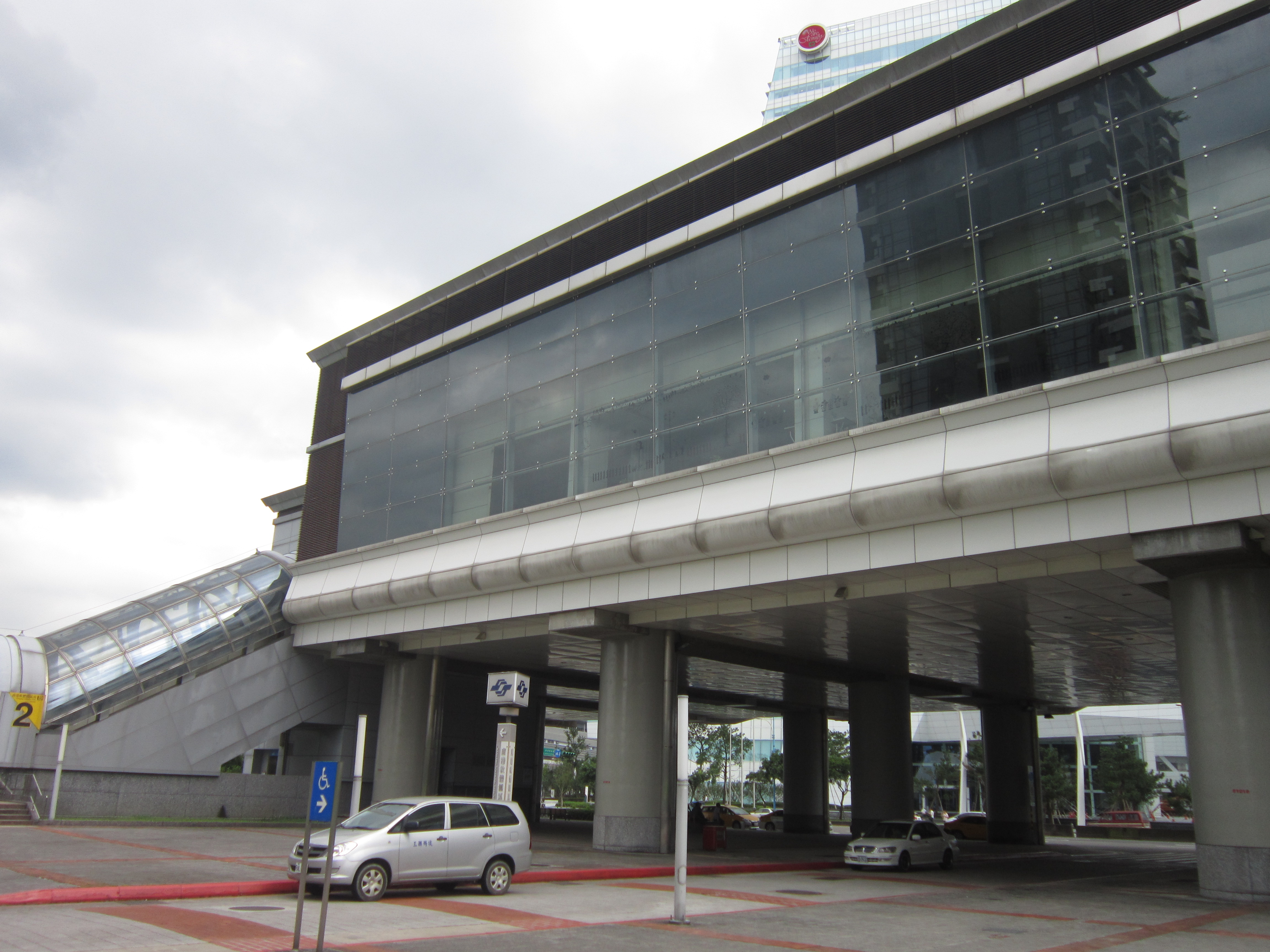 南港軟體園區高架車站及二號出入口